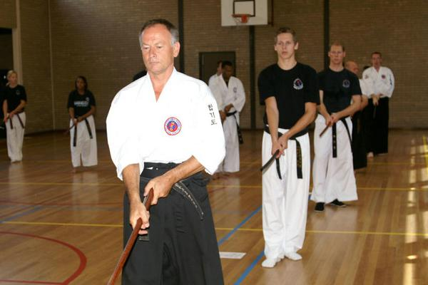 Hankumdo Foto afkomstig van mijn eigen website en dus ook met mijn toestemming hier geplaatst.